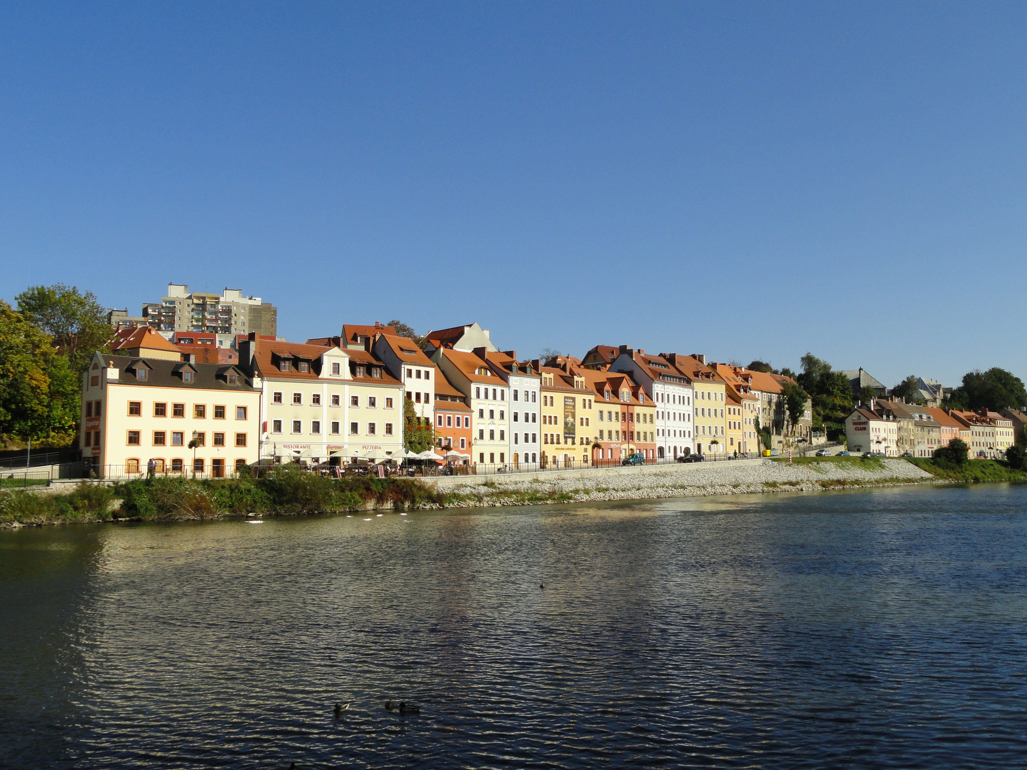 Zgorzelecer Neißevorstadt